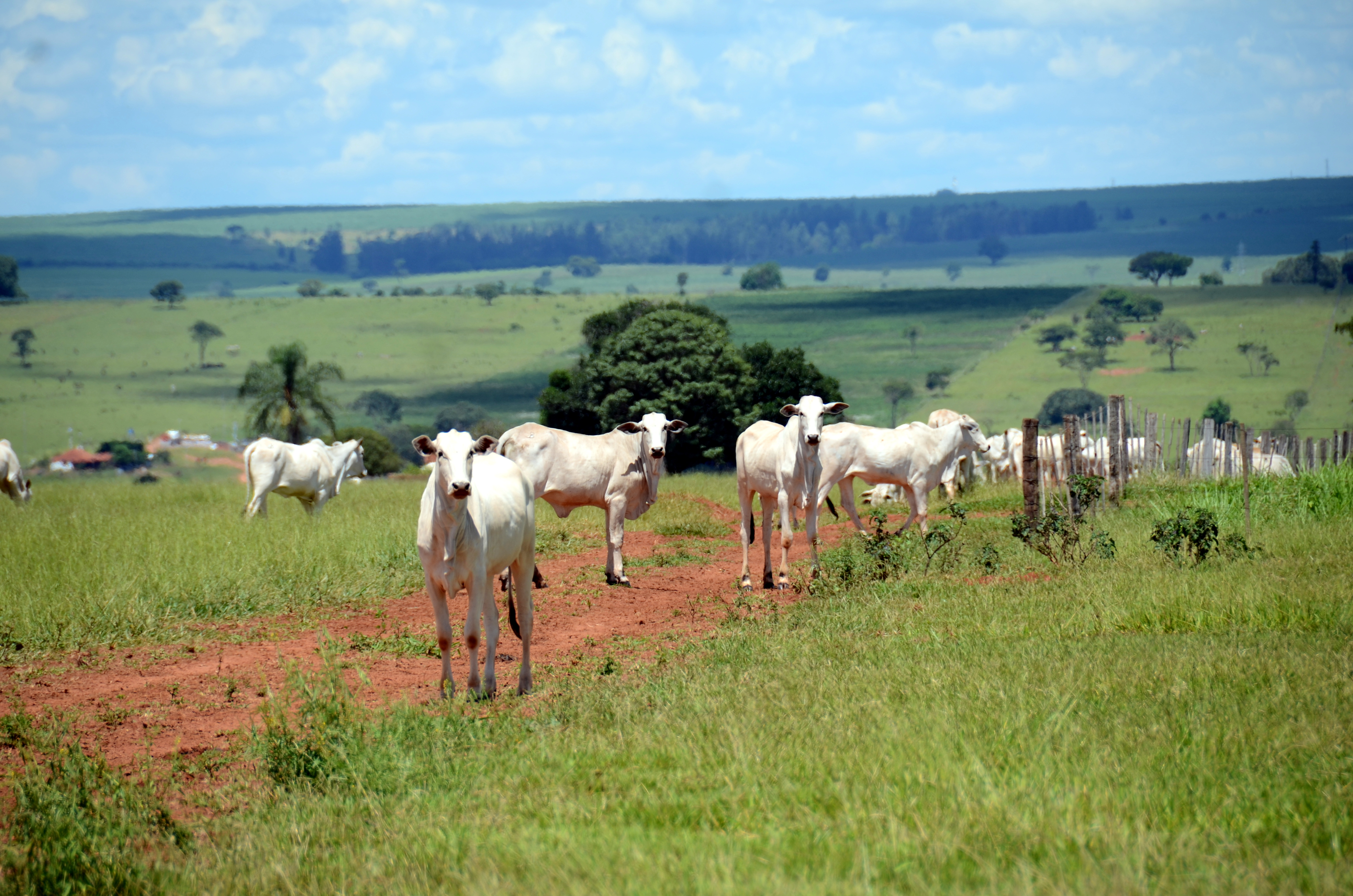 Visita a Microbacia de João Ramalho - João Ramalho - SP, Brasil.